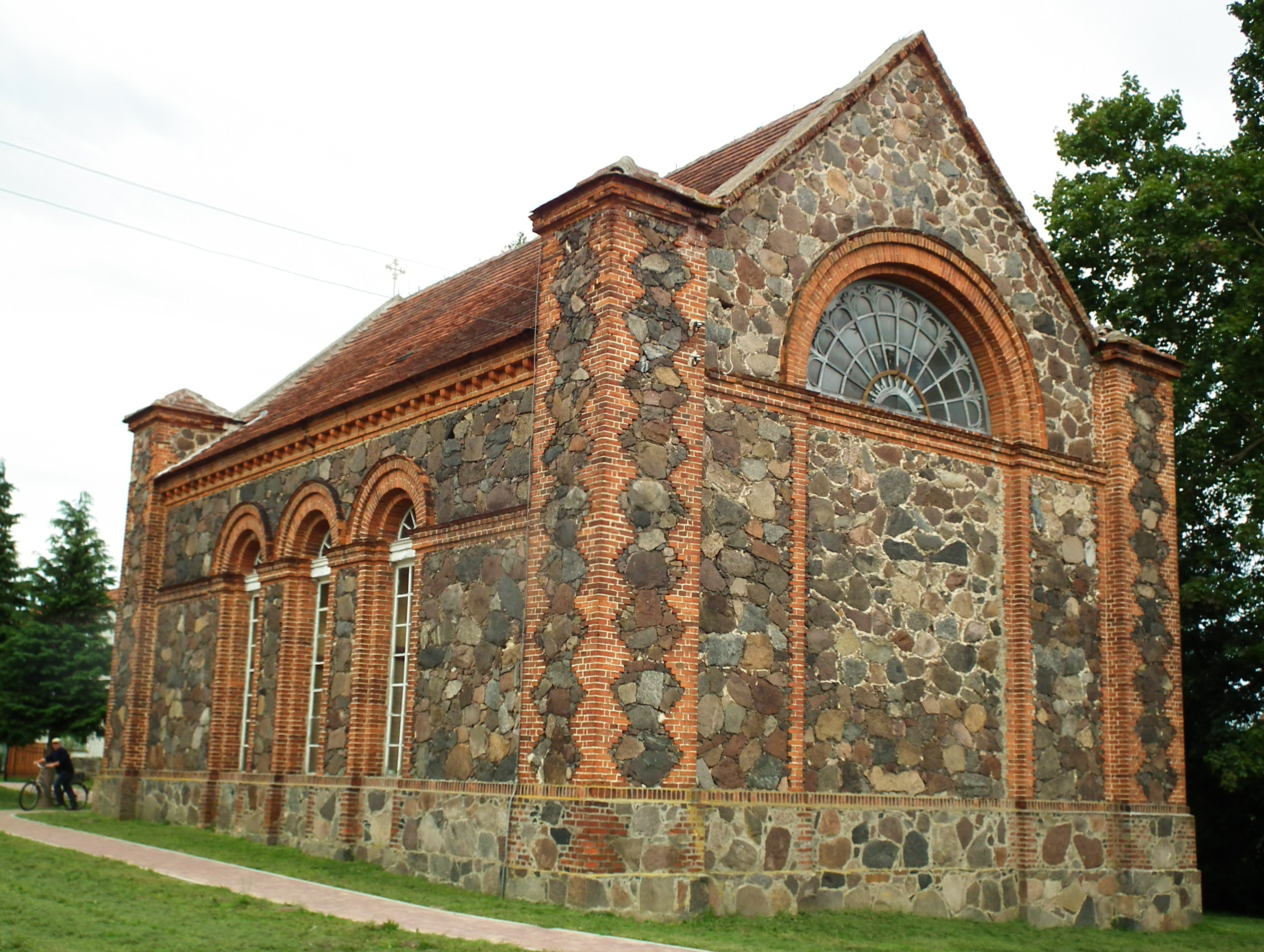 Lubień - dawny kościół ewangelicki, obecnie rzymskokatolicki p.w. Niepokalanego Serca NMP, 1830